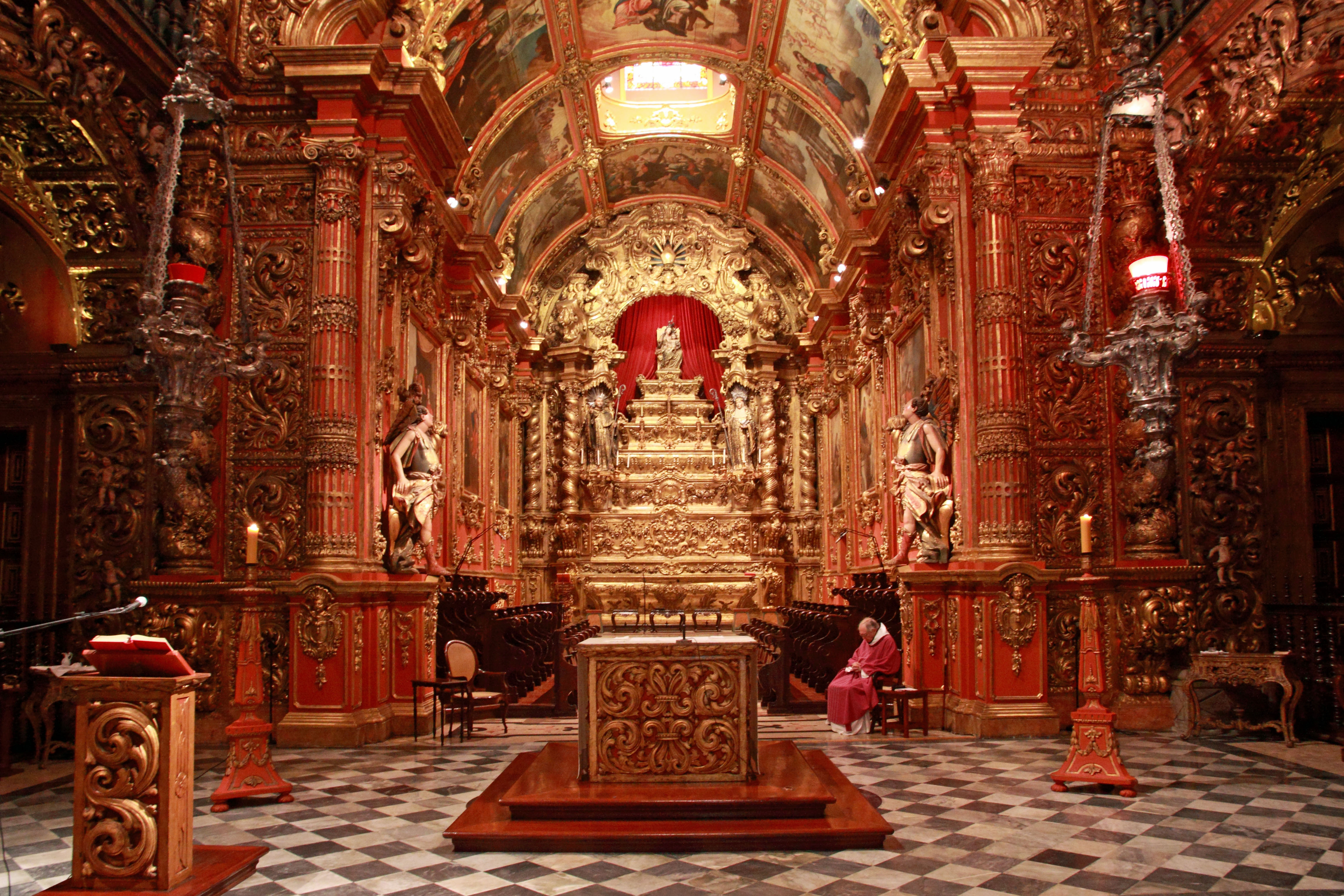 Mosteiro de São Bento do Rio de Janeiro - Capela Mor